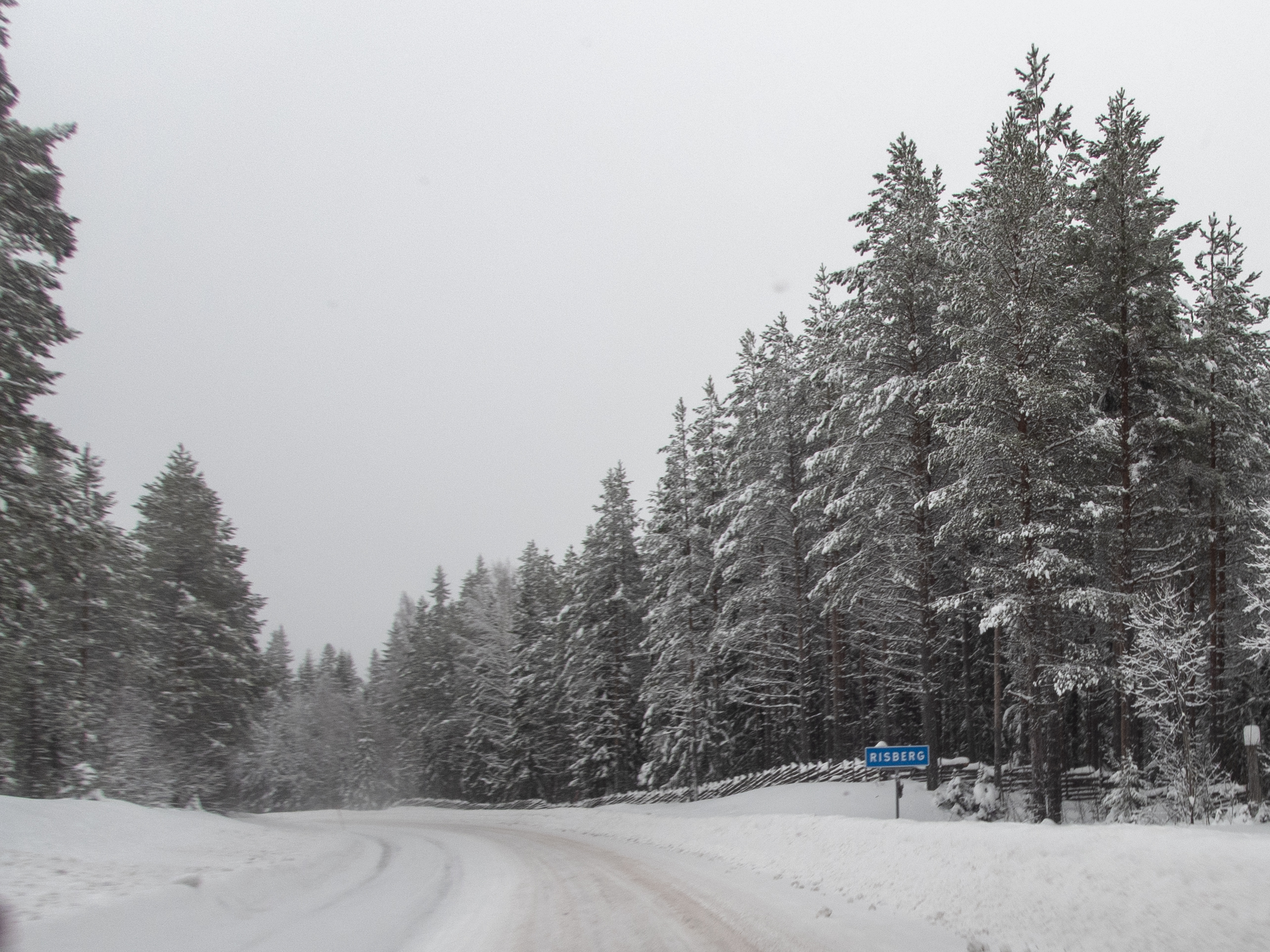 Risberg, Älvdalens kommun